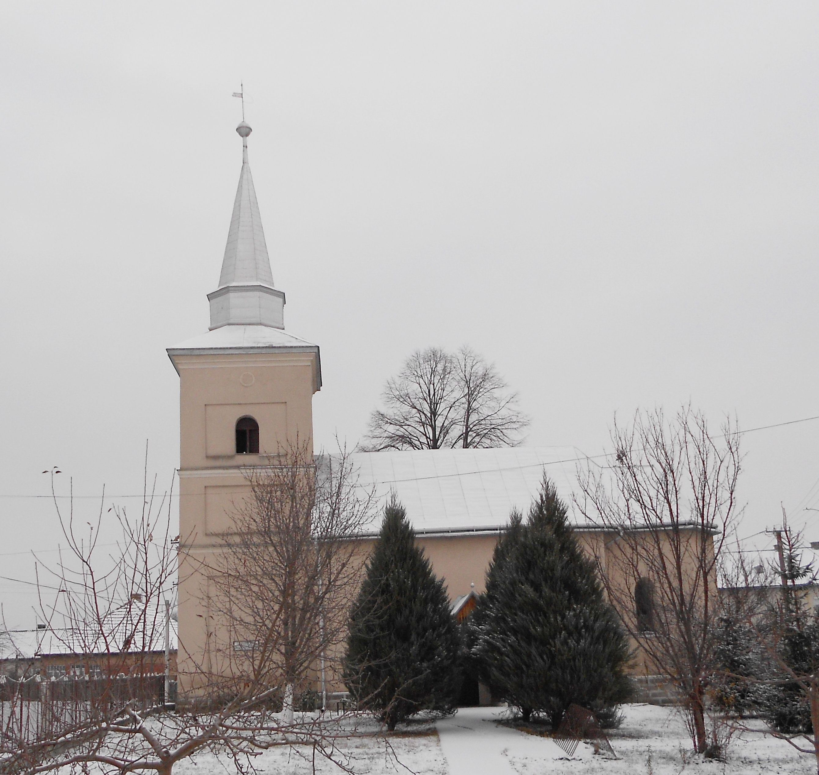 Реформатська церква в с. Оросієво